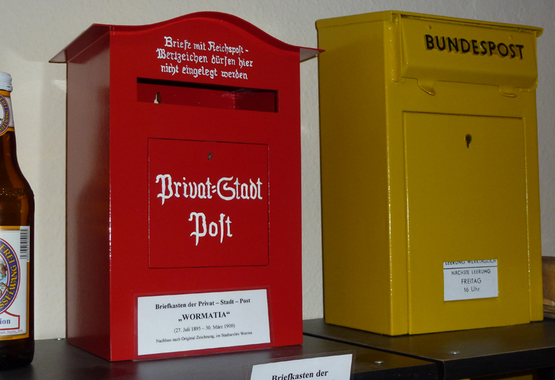 Post-Briefkästen im Rheinhessischen Postmuseum: links in rot ein Kasten der Privat-Stadt-Post "Wormatia" welche vom 27. Juli 1895 bis 30. März 1900 bestand und rechts daneben ein kleiner Postbriefkasten der Deutschen Bundespost. Zum Größenvergleich im linken Bildrand ein Bierflasche.